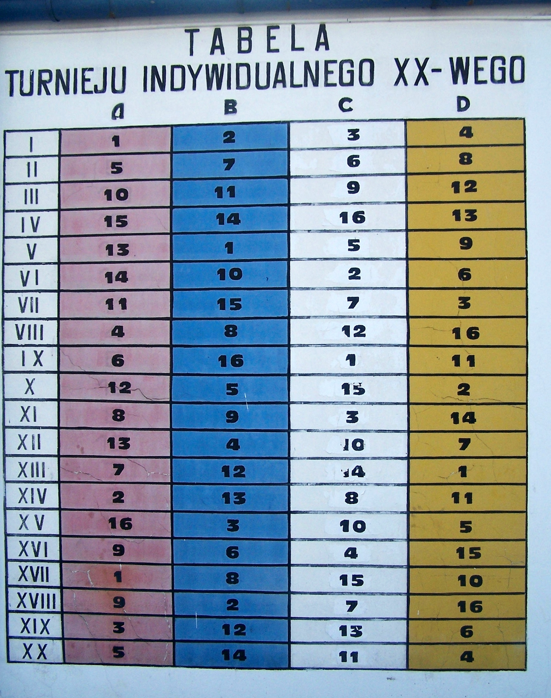 Dwudziestobiegówka rozkład biegowy podczas indywidualnych zawodów żużlowych dla 16 zawodników